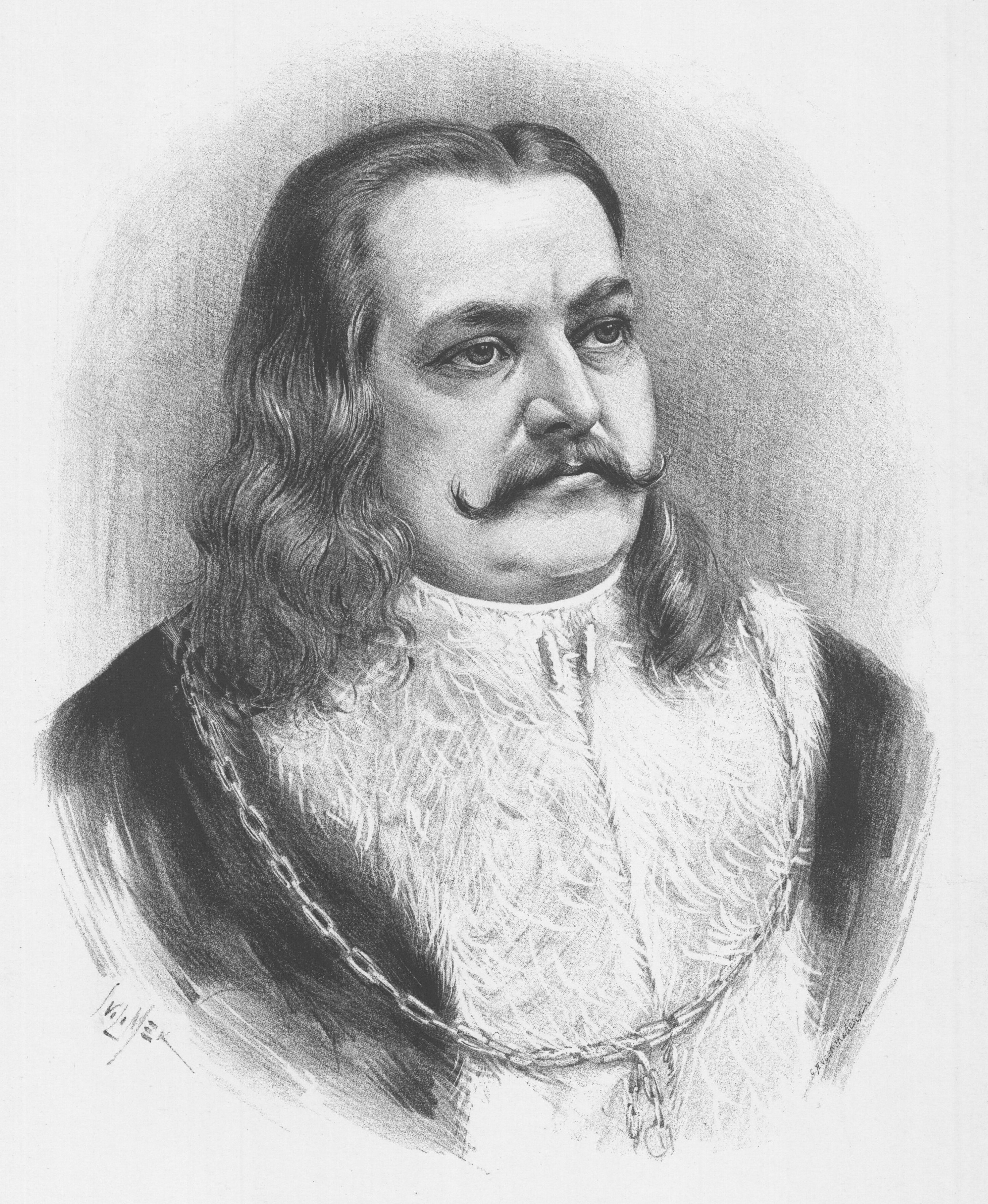 Jan Vilímek - Jiří z Poděbrad a z Kunštátu